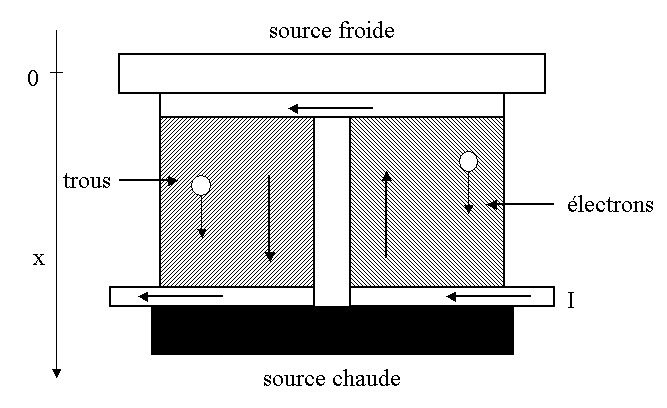 Schéma décrivant le principe d'un module de refroisissement thermoélectrique. dessin réalisé par Utilisateur:David Berardan Utilisateur:David Berardan